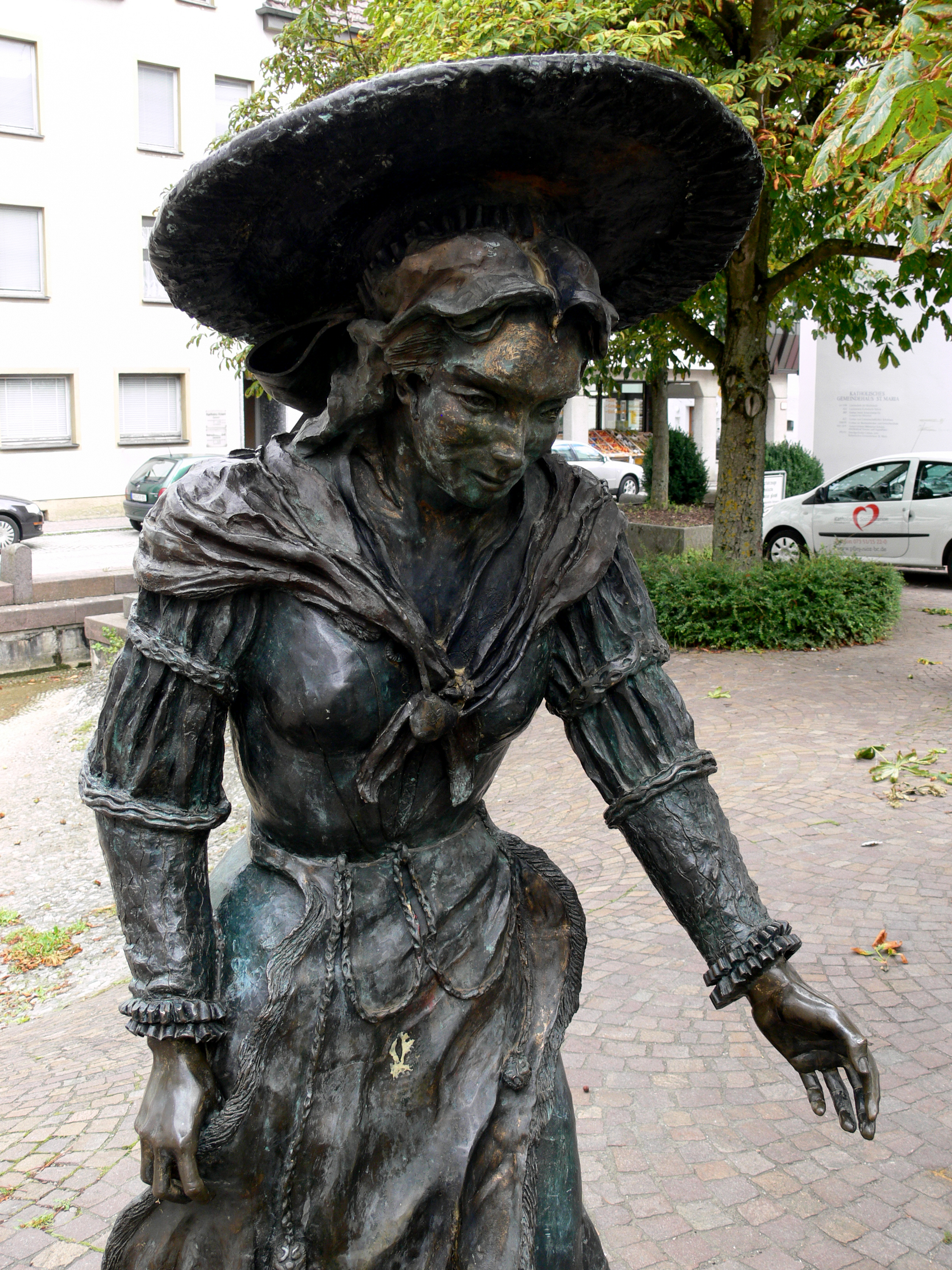 Biberach an der Riß Trachtengruppe hinter der Kirche St. Martin, von Danielle Bigata, 1994, Detail